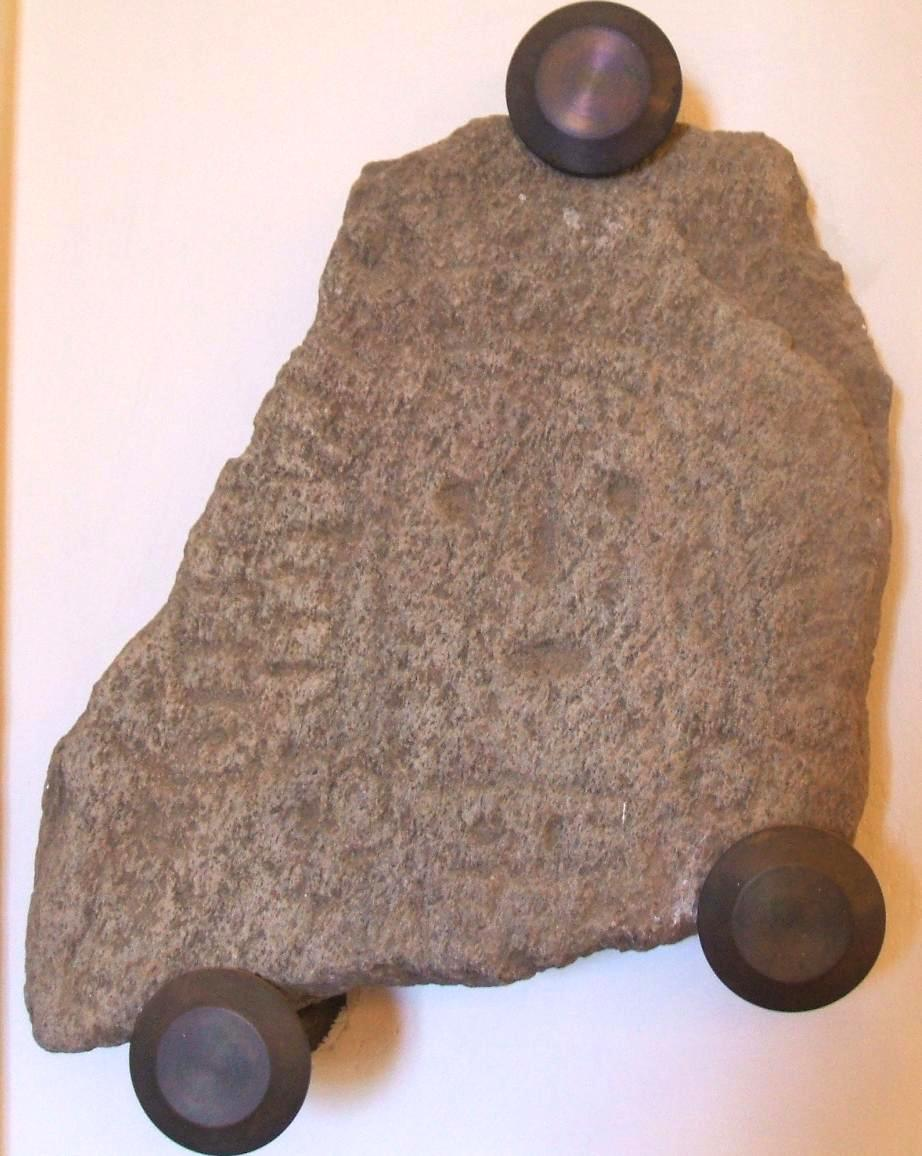 Bodonal de la Sierra estela